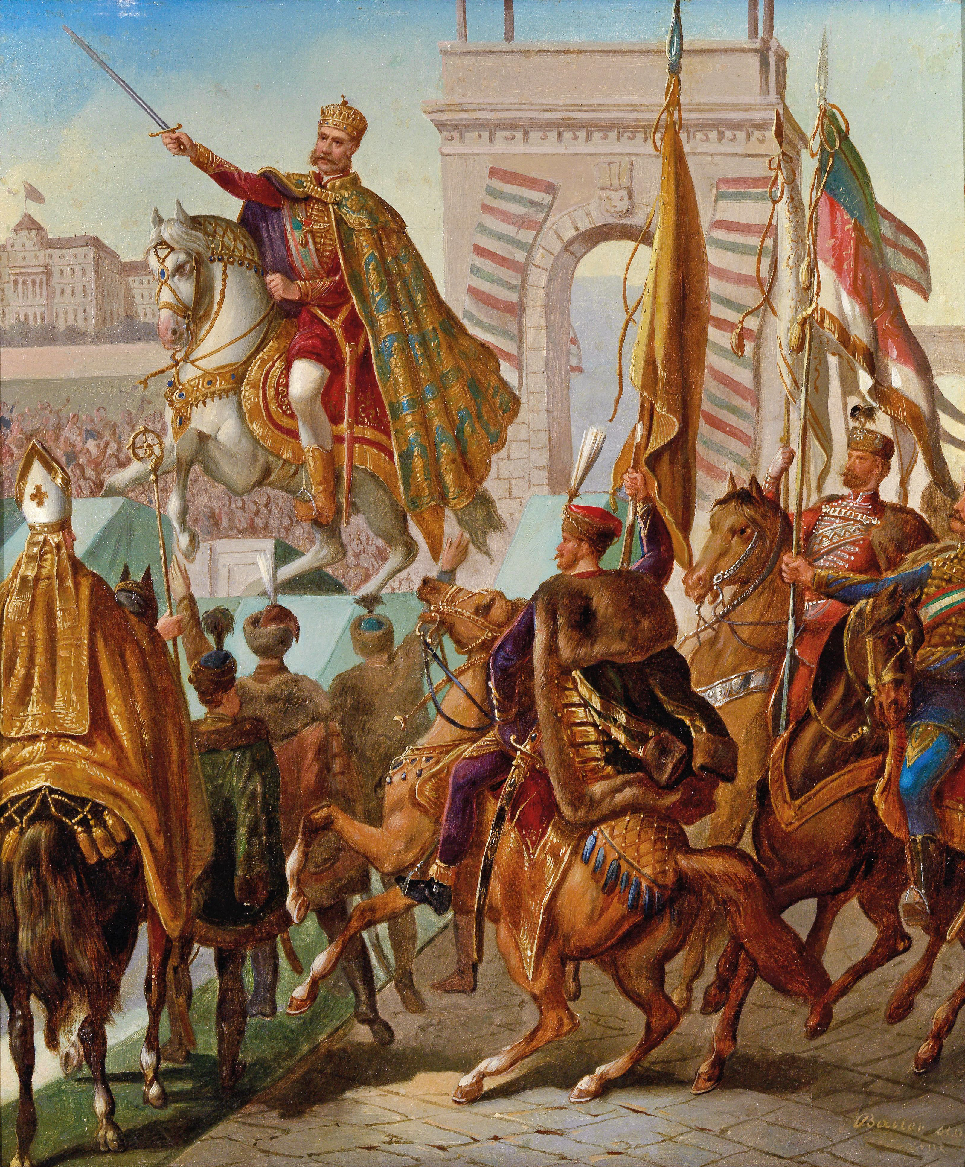 "Die Krönung Kaiser Franz Joseph I. von Österreich zum König von Ungarn am 8. Juni 1867", Öl auf Metall, 59 x 50 cm, signiert "Bauer sen."